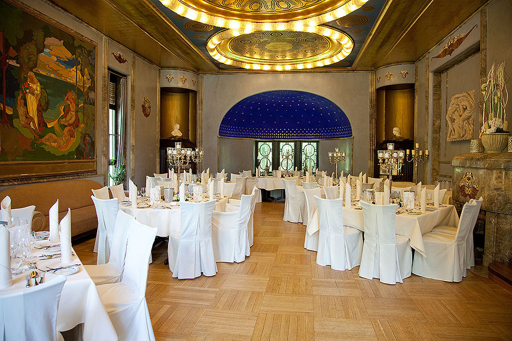 Dippelshof Musikzimmer (Blauer Saal)